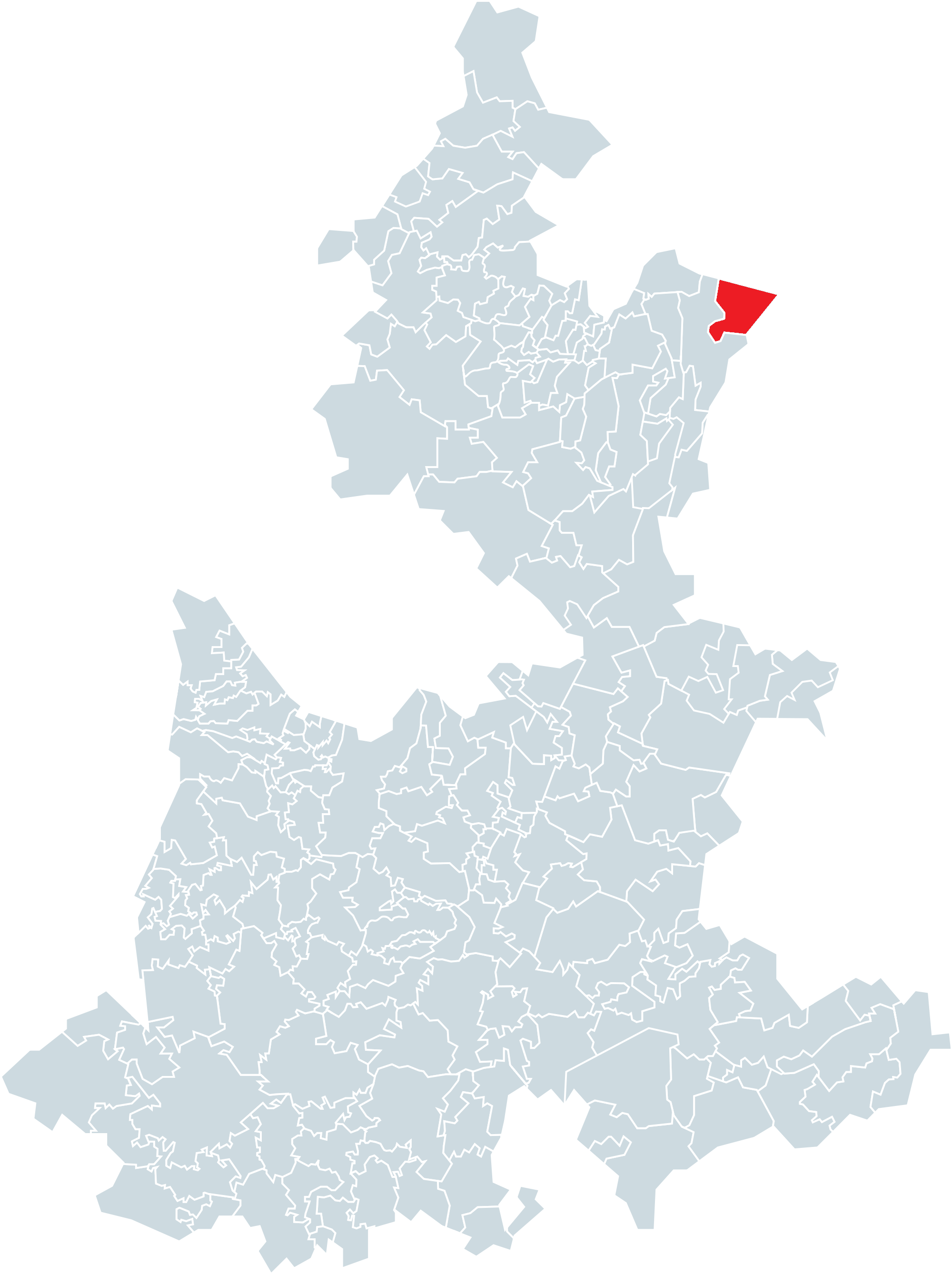 Municipio de Acateno